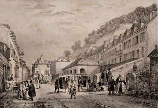 Baréges - l'établissement thermal en 1821